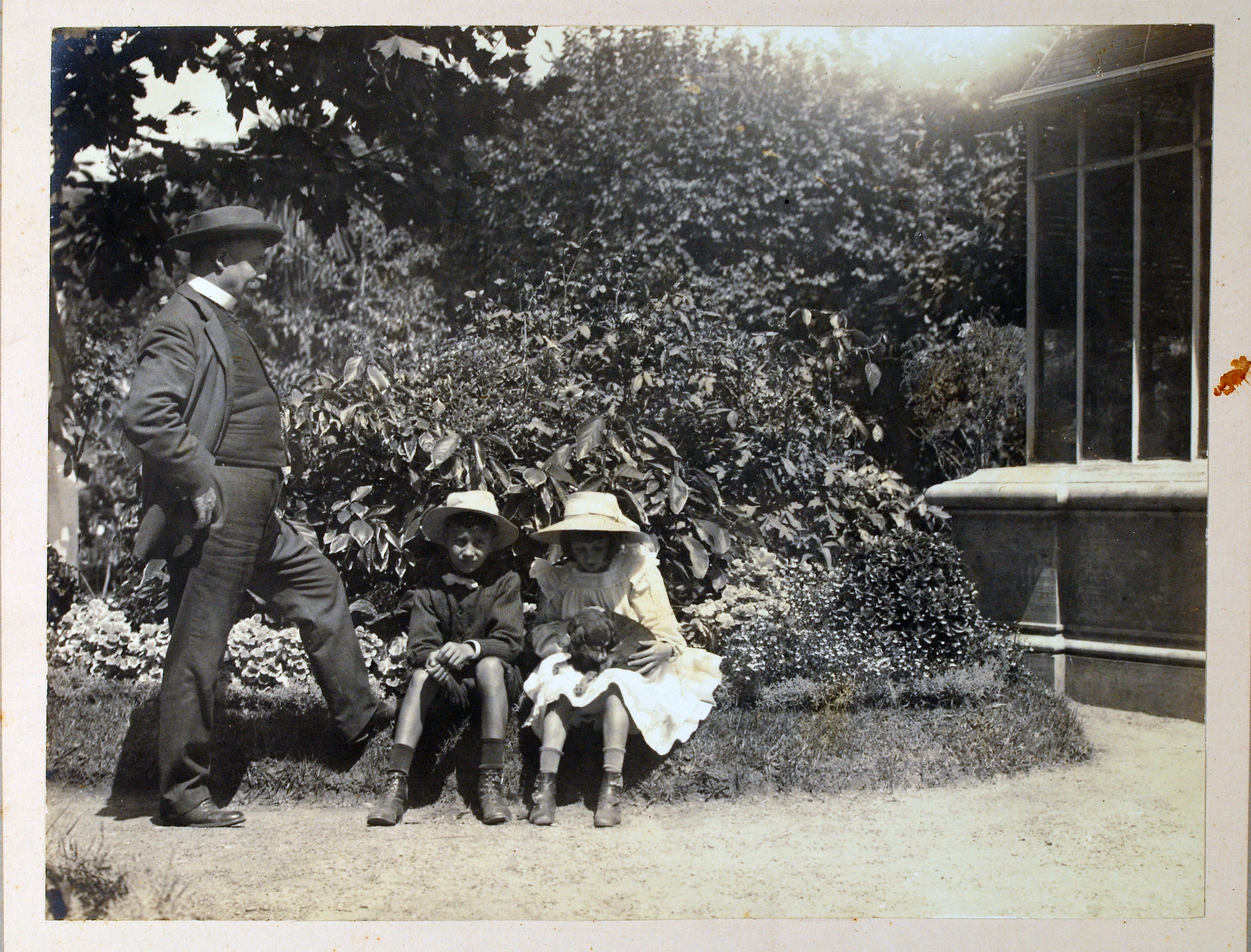 Carlos Thays con sus hijos Carlos Leon y Ernestina en el Jardín Botánico, su casa familiar.